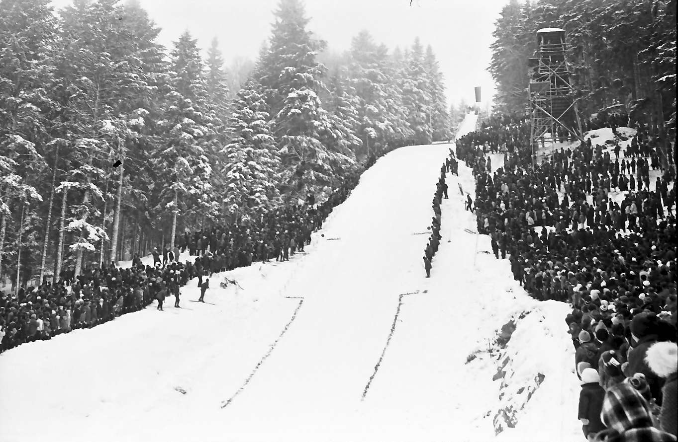 Adlerschanze ski jumping hill in Hinterzarten, Germany